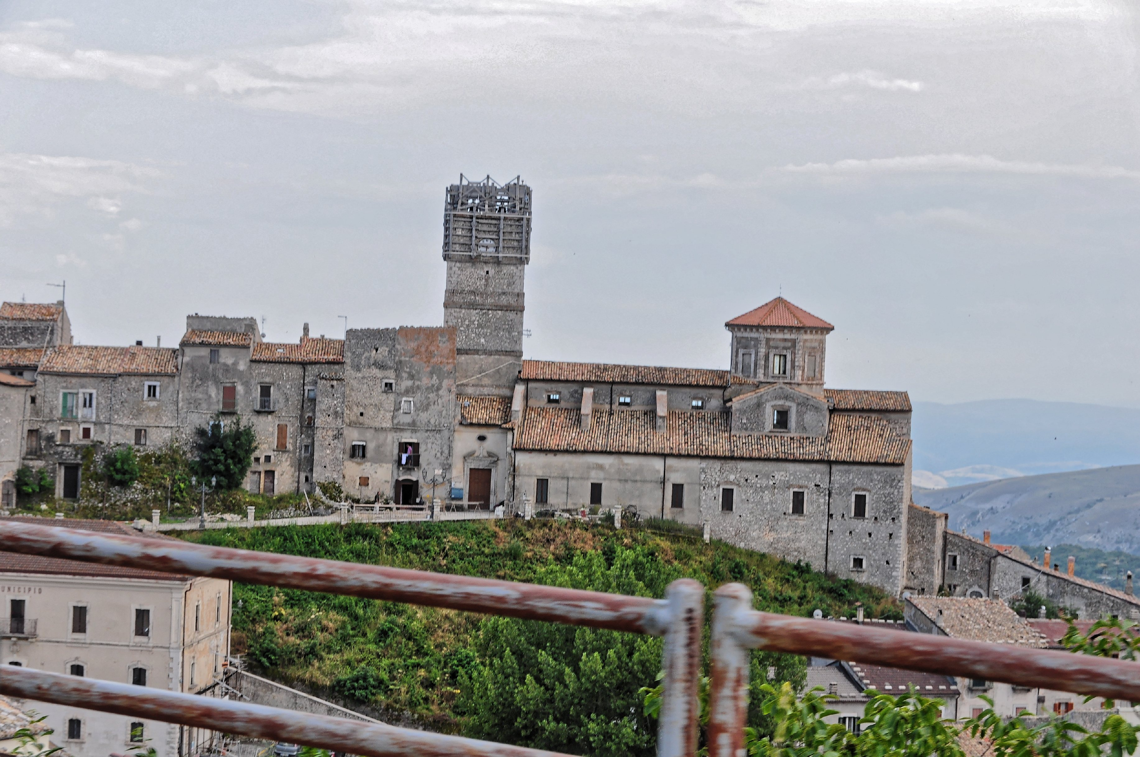 Castel del Monte 2013 Dieses Foto entstand in Zusammenarbeit mit Stadtbesichtigungen.de Die Seiten Stadtbesichtigungen.de, der dazugehörige Reise Blog sowie die Facebookseite: Stadtbesichtigungen Rom dürfen dieses Bild für Ihre Veröffentlichungen ohne den Hinweis auf Wikipedia, Commons bzw der Lizenz verwenden. Die Verantwortlichen habe von mir (Ra Boe) die Originaldaten zur freien Verfügung übermittelt bekommen.